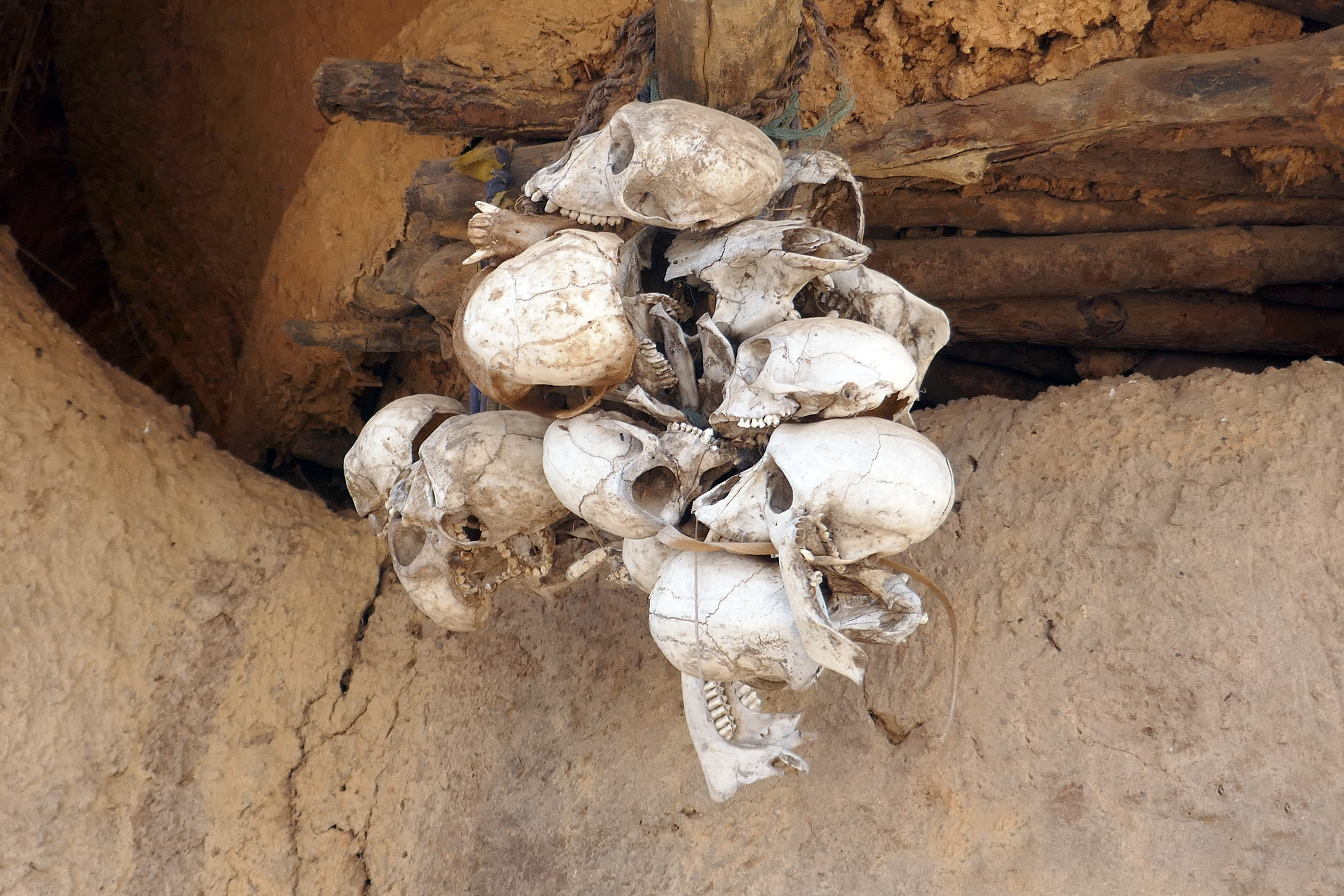 Fétiches protecteurs sur une maison de l'Atacora, au nord-ouest du Bénin (pays otammari, vers Boukoumbé).